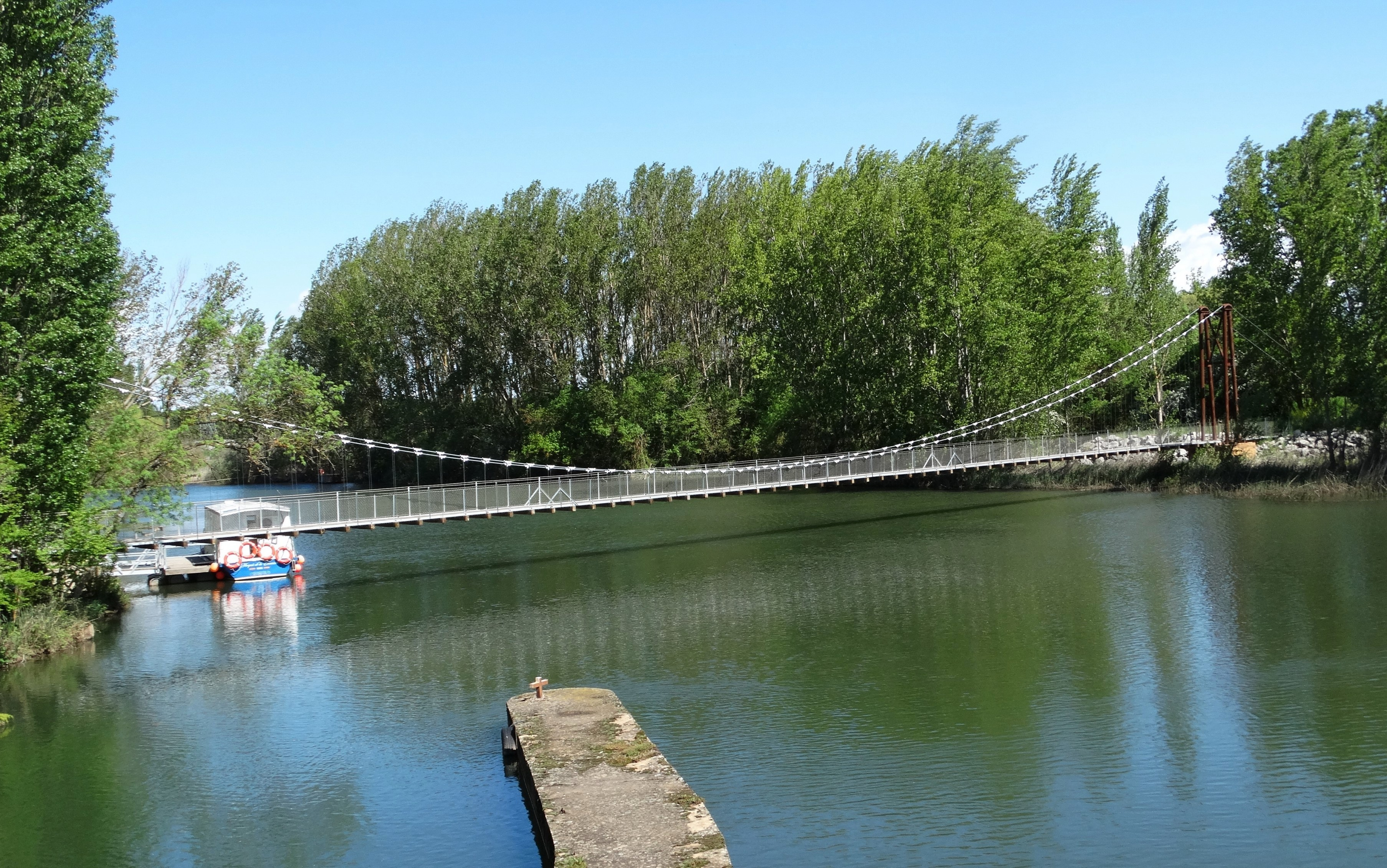 Pasarela de San Andrés sobre el río Pisuerga